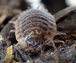 Kukurutxa bat egur ustela jaten.